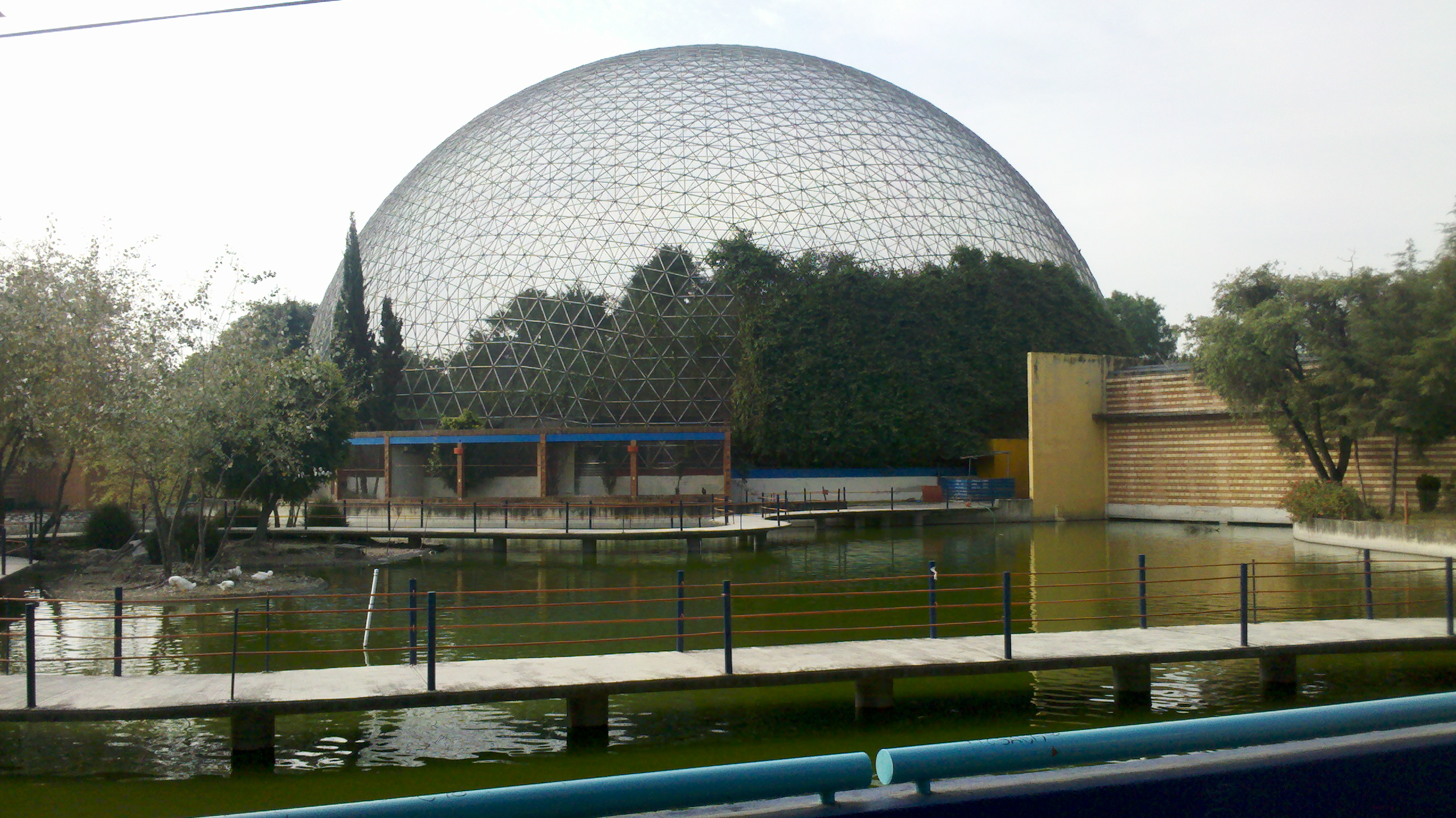 Parque Ecológico Revolución Mexicana, Puebla, México.